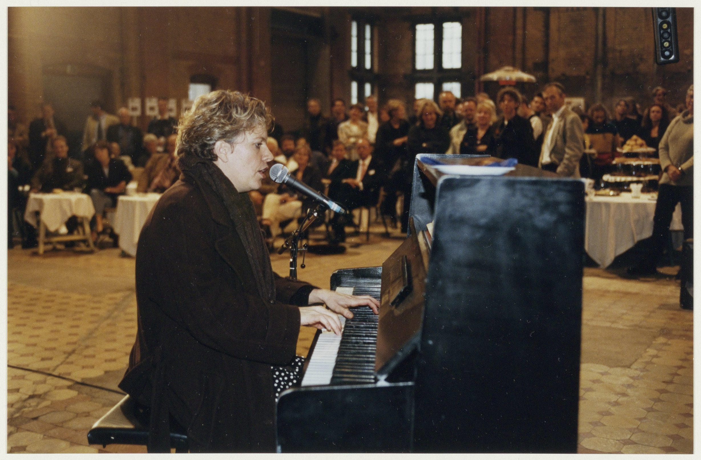 CollectieCollectie Fotoburo de BoerInventarisnummerNL-HlmNHA_54037127NL-HlmNHA_1478_44780kBeschrijvingBrigitte Kaandorp treedt op ter gelegenheid van het binnenhalen van overheidsgelden, in het voormalige ketelhuis van het EBH-complex. De gemeente presenteerde daar de eerste elf plannen die in het kader van de Schat van de Spaarnestad werden uitgevoerd.FotonummerNL-HlmNHA_1478_3361DocumenttypeHistorieprenten, tekeningen en foto'sVervaardigerHeeremans, Edwin (UP de Boer) Soort vervaardigerFotograaf AnnotatiesHD 161097PersonenKaandorp, Brigitte Functies personencabaretière LandNederland ProvincieNoord-Holland GemeenteHaarlem PlaatsHaarlem StraatHarmenjansweg Begindatum15-10-1997Einddatum15-10-1997TechniekFoto Trefwoordenbedrijven, kunst en cultuur, Gemeentewerken, gebouwen